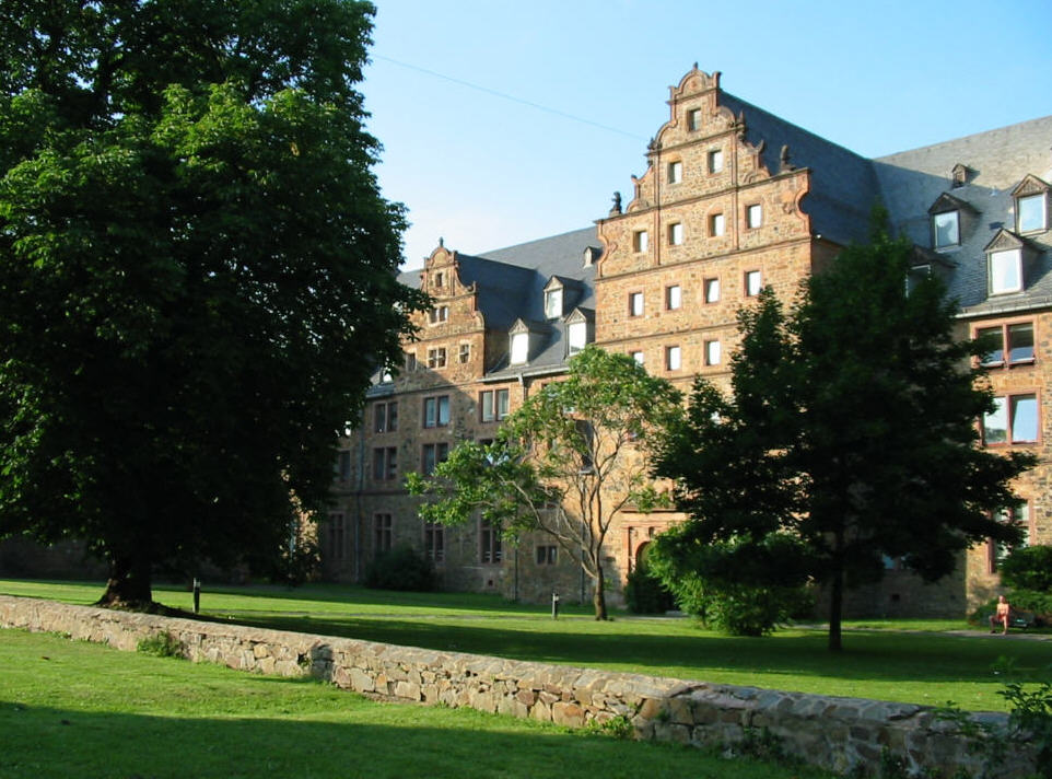 Fassade des Zeughauses, Privatarchiv